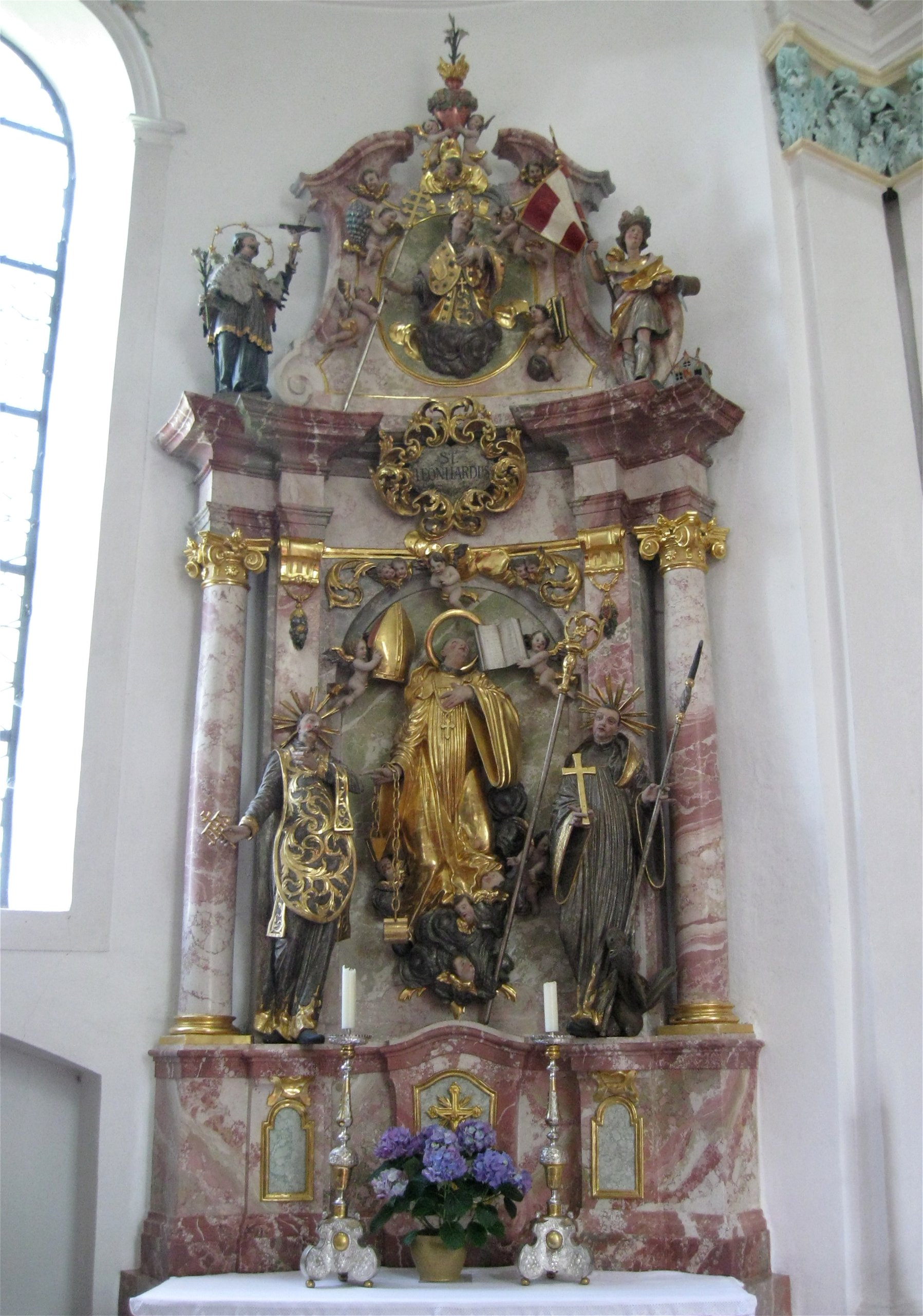 Heuwinklstraße 58, Iffeldorf; Kath. Wallfahrtskapelle St. Maria, Heuwinklkapelle, Runder Zentralbau von Johann Schmuzer, 1698 ff.; mit Ausstattung. St.-Leonhard-Altar.